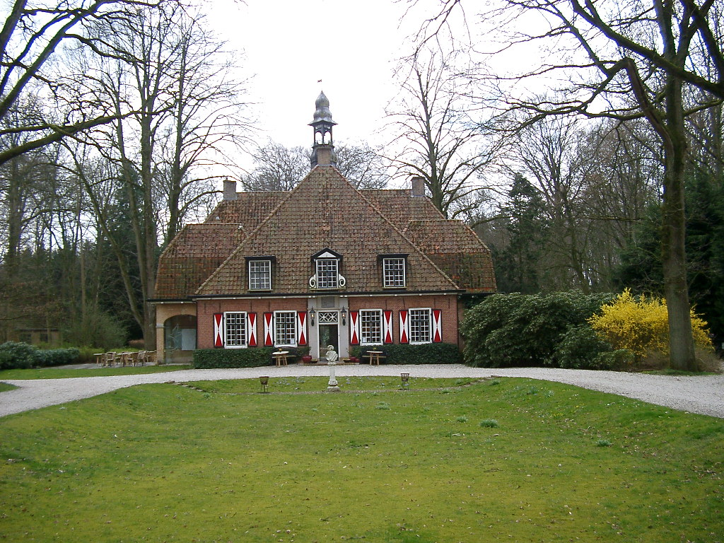 Historische landgoed Slotplaats in Bakkeveen